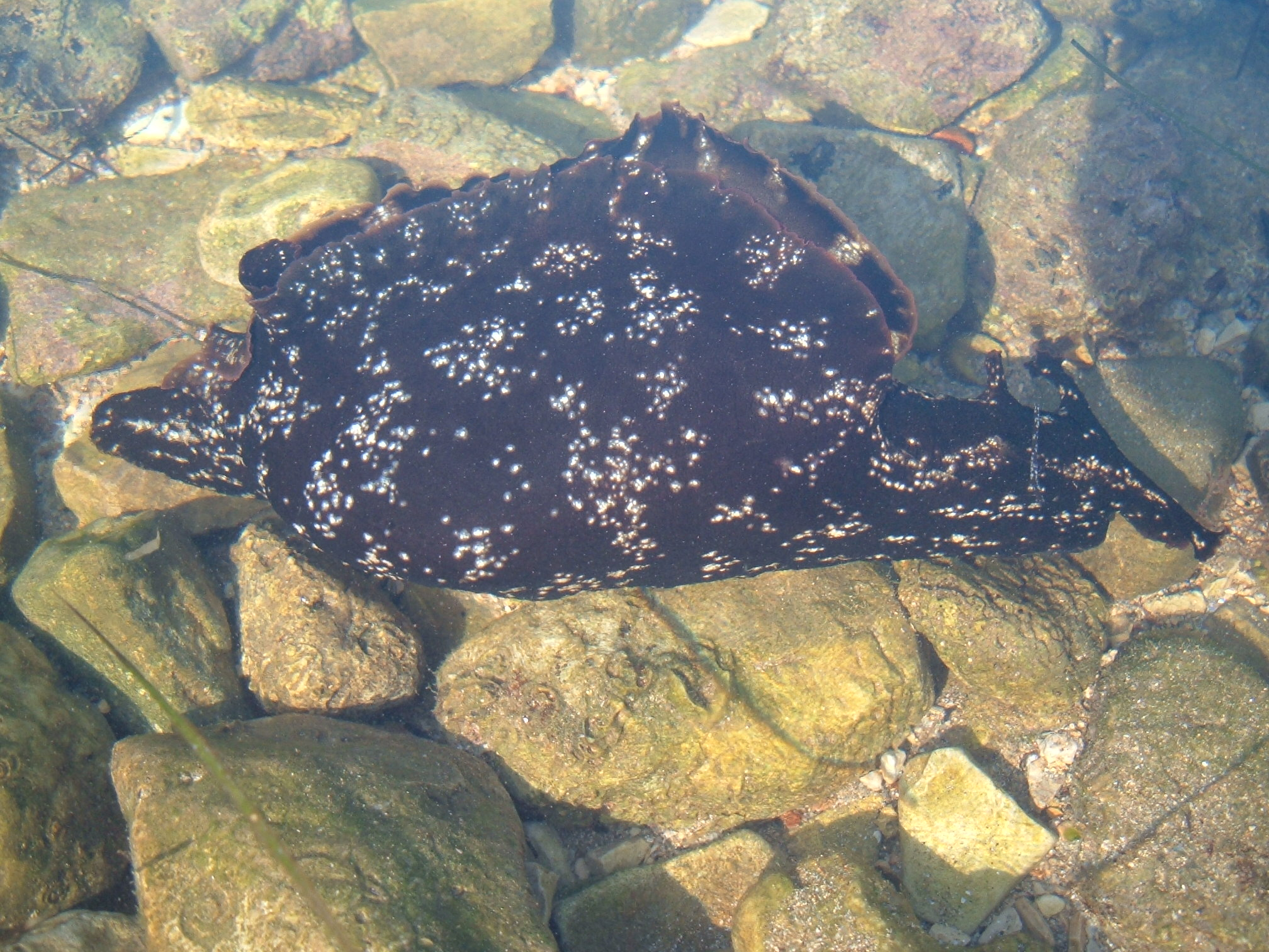 Tengeri nyúl Rovinjnál